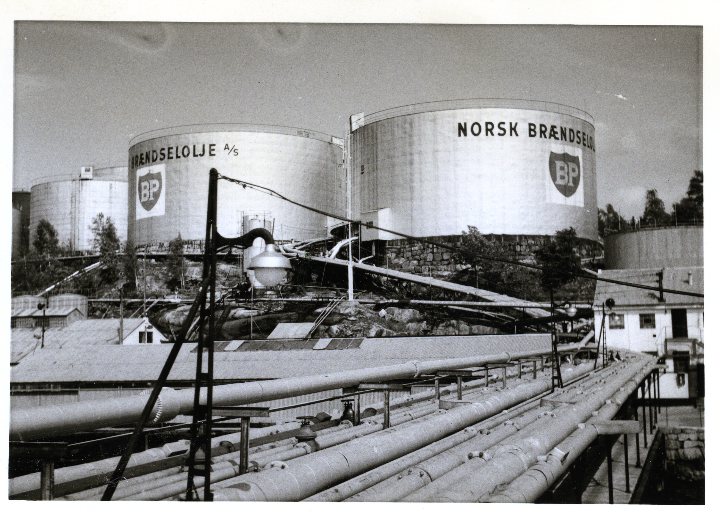 Bildet er hentet fra Arkivverket. Norsk Brændselolje. Hovedanlegget på Fagerstrand. Juni 1967. Arkivinstitusjon : Statsarkivet i Stavanger Arkivnavn : Pa 1761 - Statoil Fuel and Retail Norge AS Sted : Norge, Akershus, Nesodden, Fagerstrand Emneord: Olje, Petroleum, Tankanlegg Avbildet